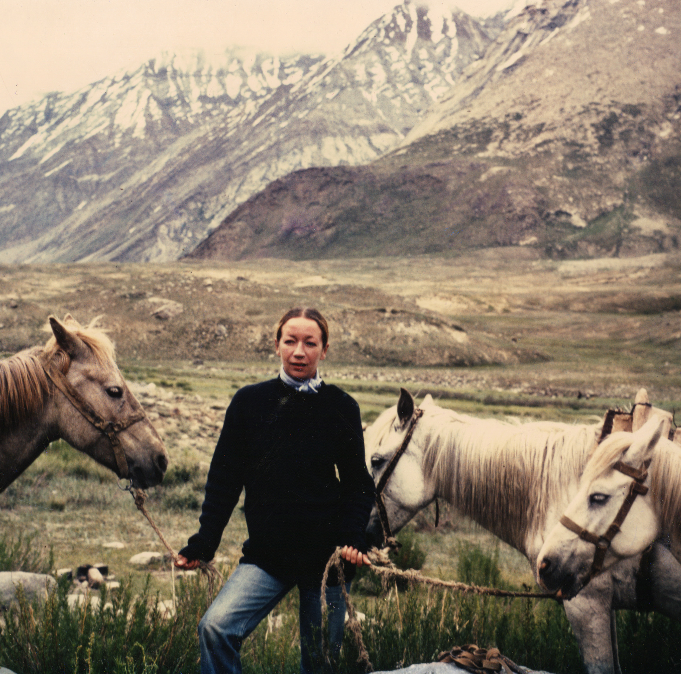 Marie-José Lamothe au Zanskar, 1980. Photo d'André Velter.